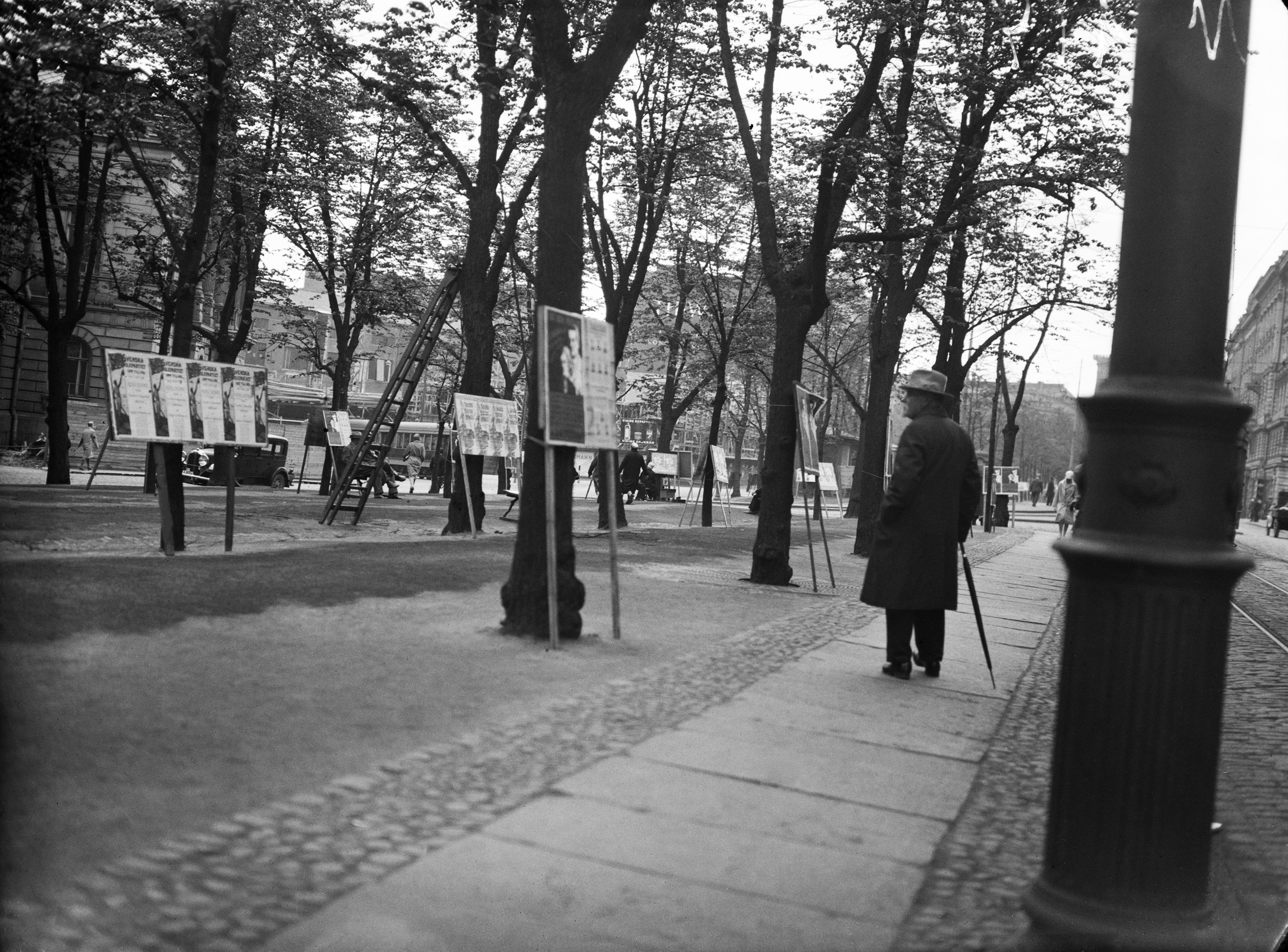 Vuoden 1930 eduskuntavaalien vaalimainoksia Heikinesplanadilla (= Mannerheimintie), vas Vanha ylioppilastalo.